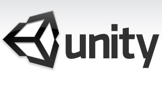 Logo del motore di sviluppo di videogiochi, Unity 3D Engine